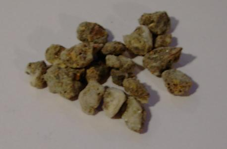 Bild mit Benzoe-Harz, das verräuchert werden kann